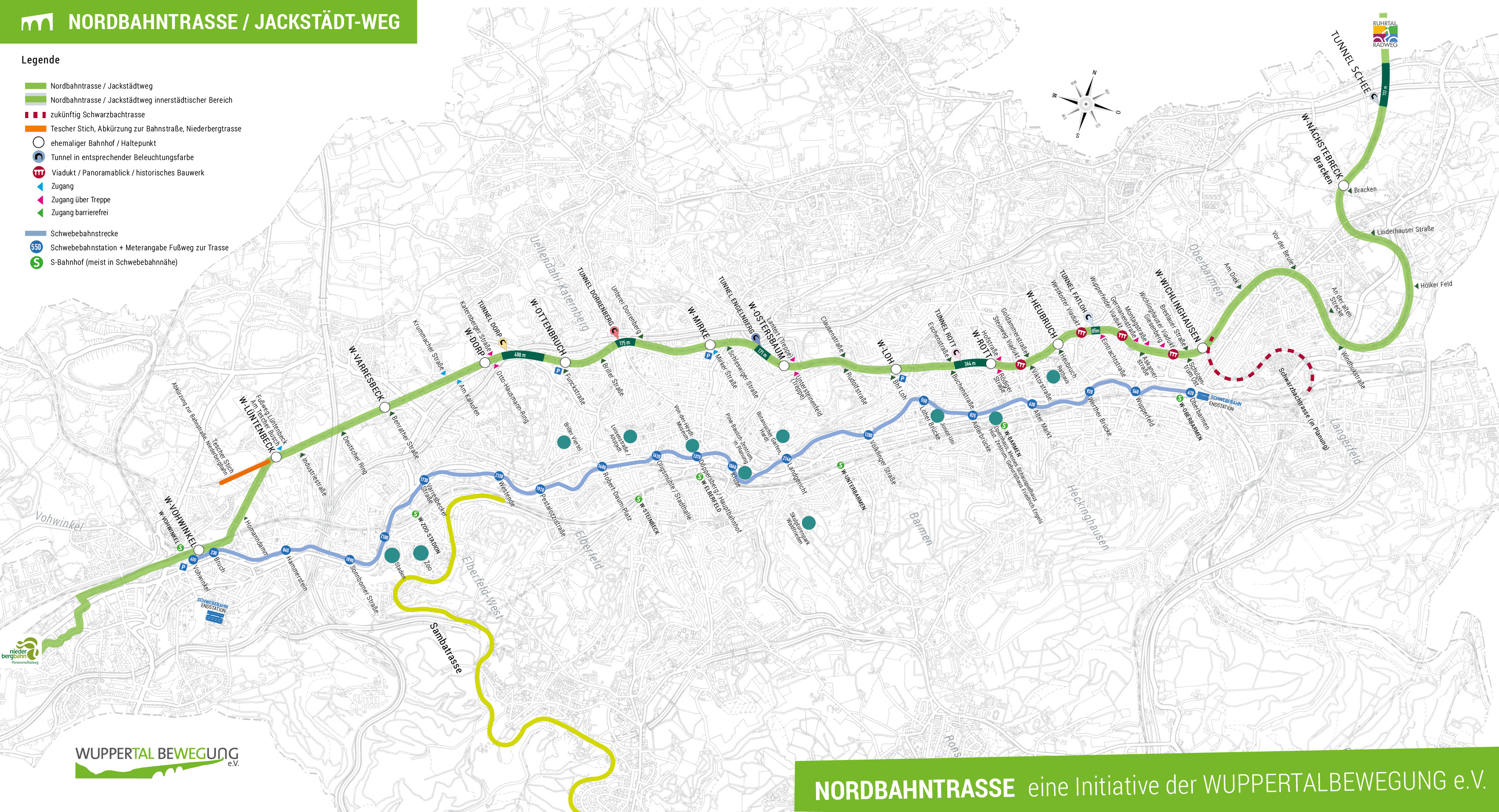 Der Plan zeigt die Nordbahntrasse den örtlichen Bezug zu der Schwebebahnstrecke und zu wichtigen kulturellen Einrichtungen